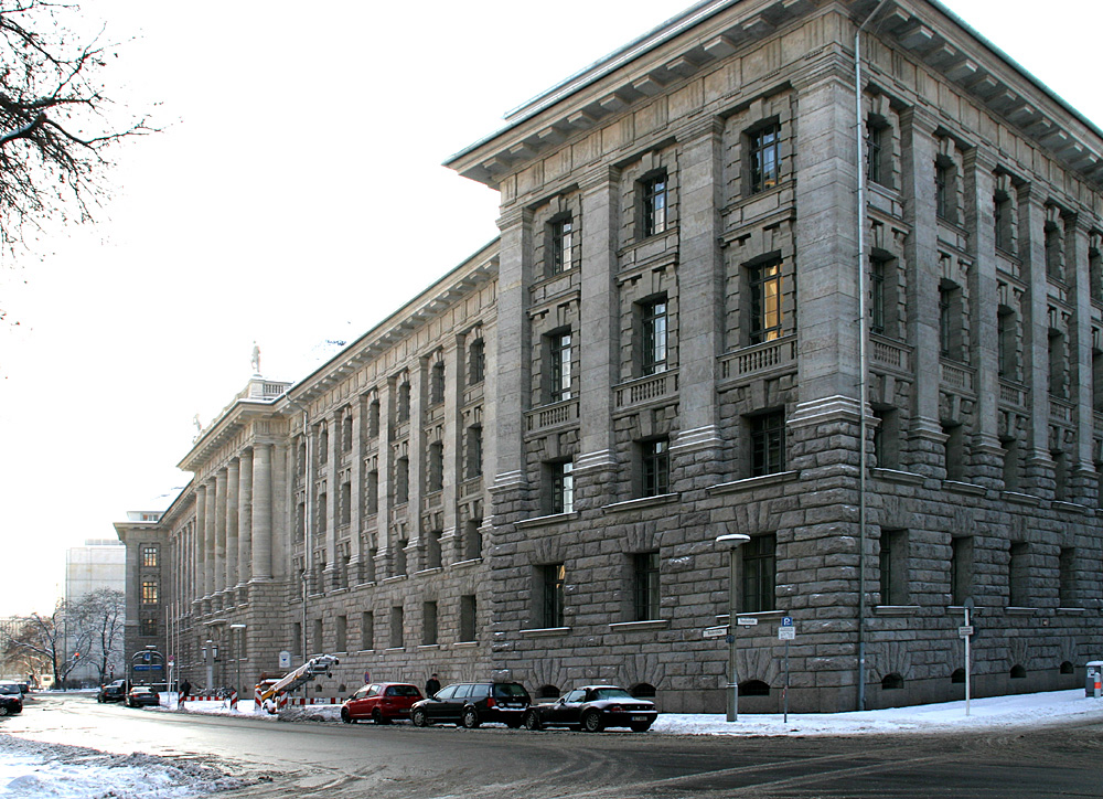 Berlin, Stadthaus, rear view from Klosterstraße Author: Elke Wetzig (elya) date: 2005-12-30